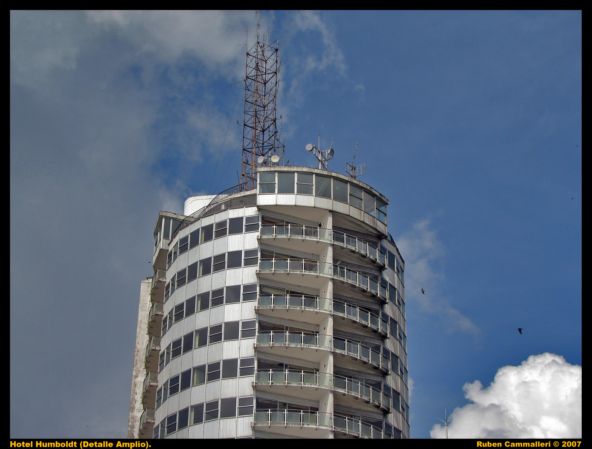 Fotografía en detalle del Hotel Humboldt en el parque Ávila Mágica.